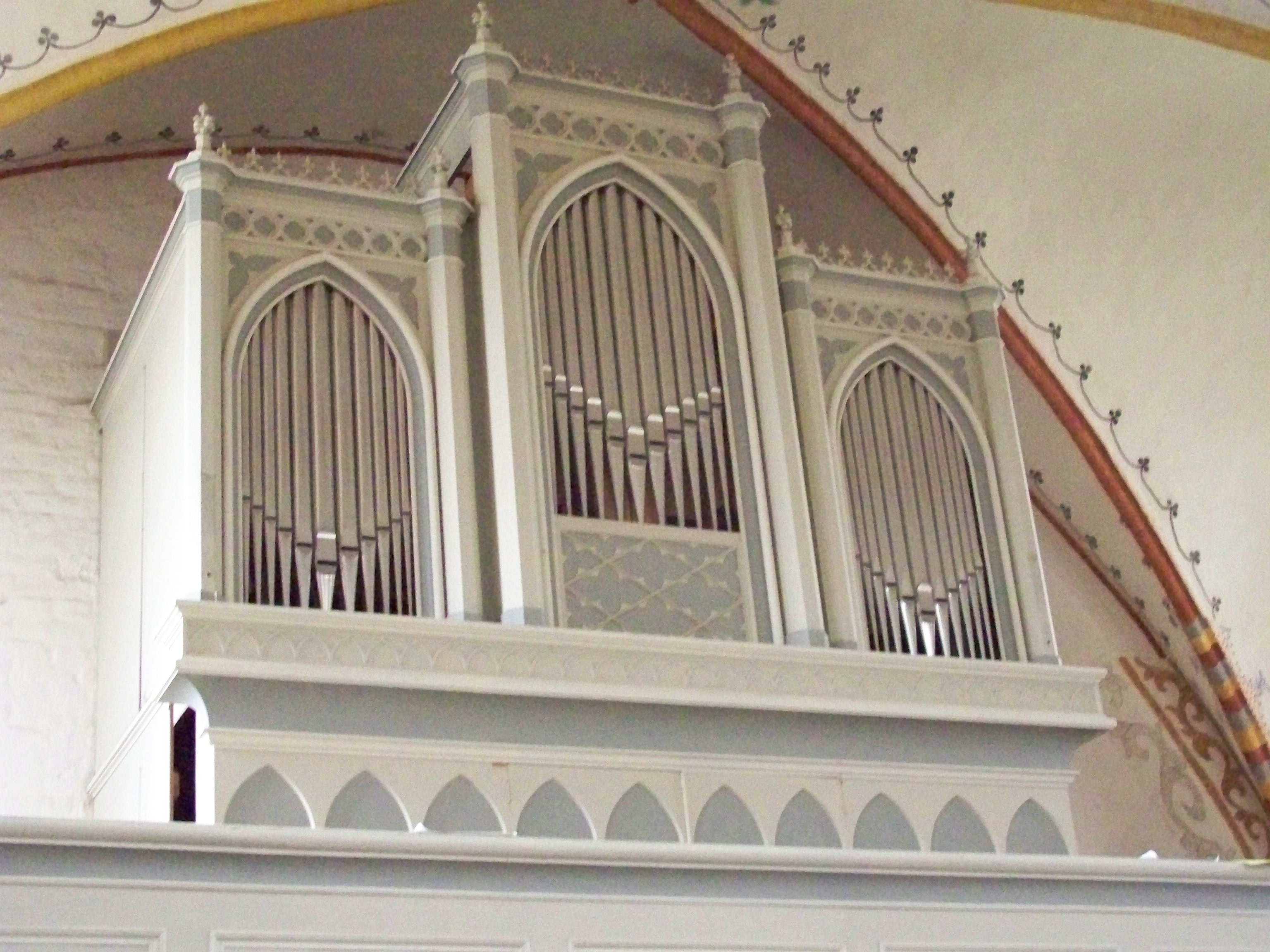 Dorfkirche_Velgast,_Buchholz-Orgel